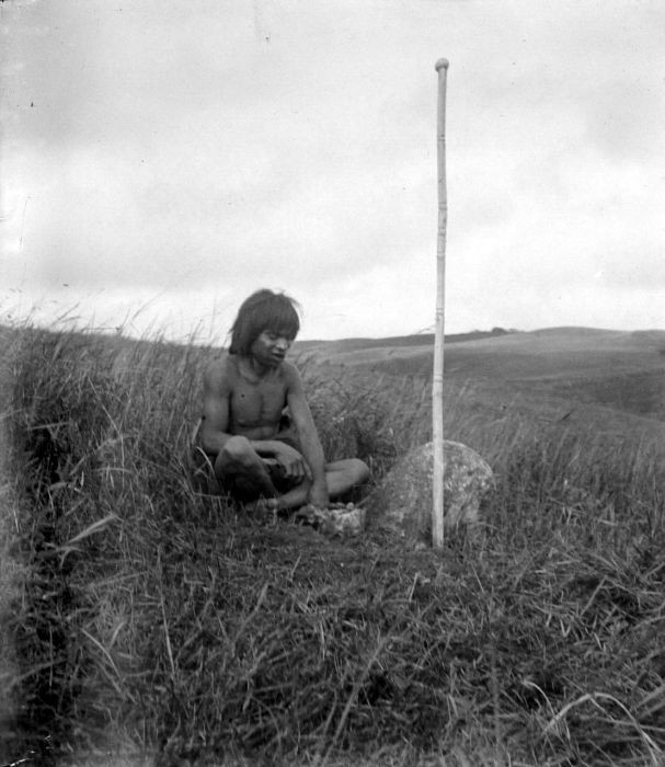 Negatief. Een man van Soemba brengt een offer bij een offerpaal (katoda roeha)